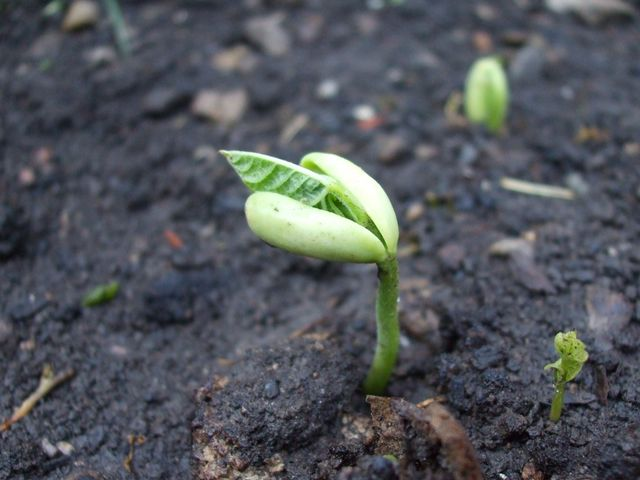 frisch keimende Stangenbohne im eigenen Garten